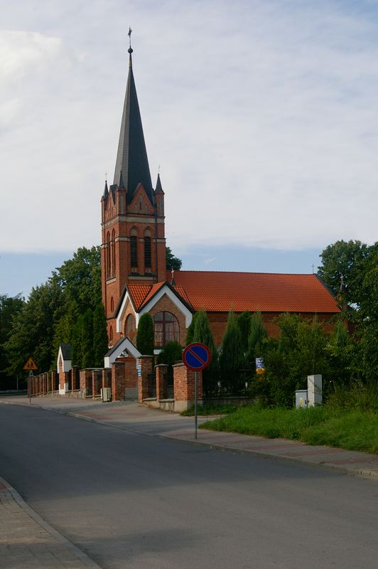 Kościół w Olecku